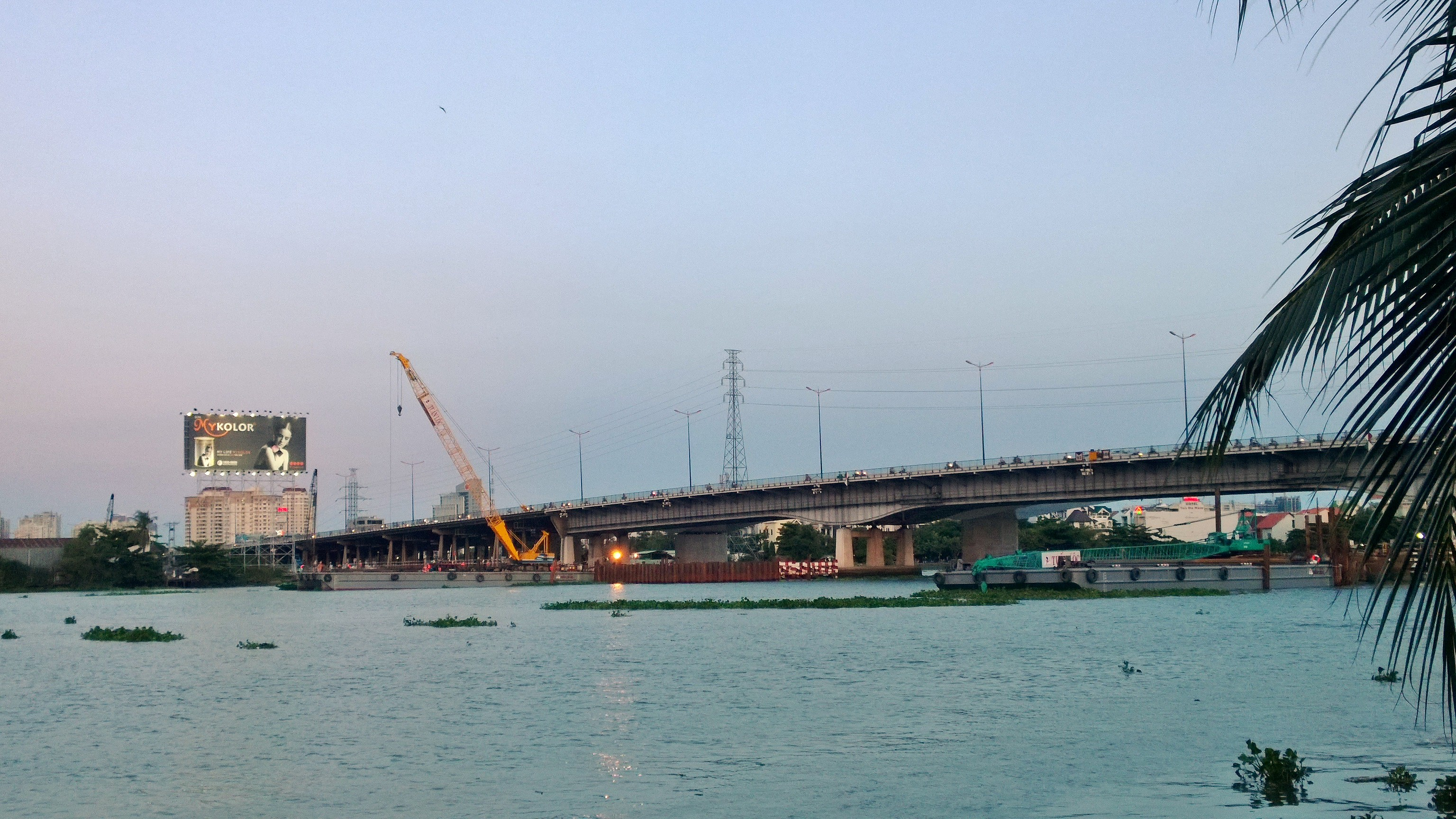 Thi cong duong xe Dien tren song Saigon, thao Dien q2, hcmvn